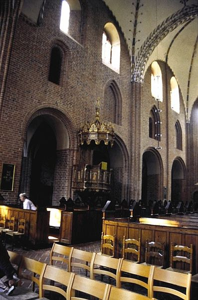 Løgumkloster Kirke i Danmark. Skibet set mod sydvest